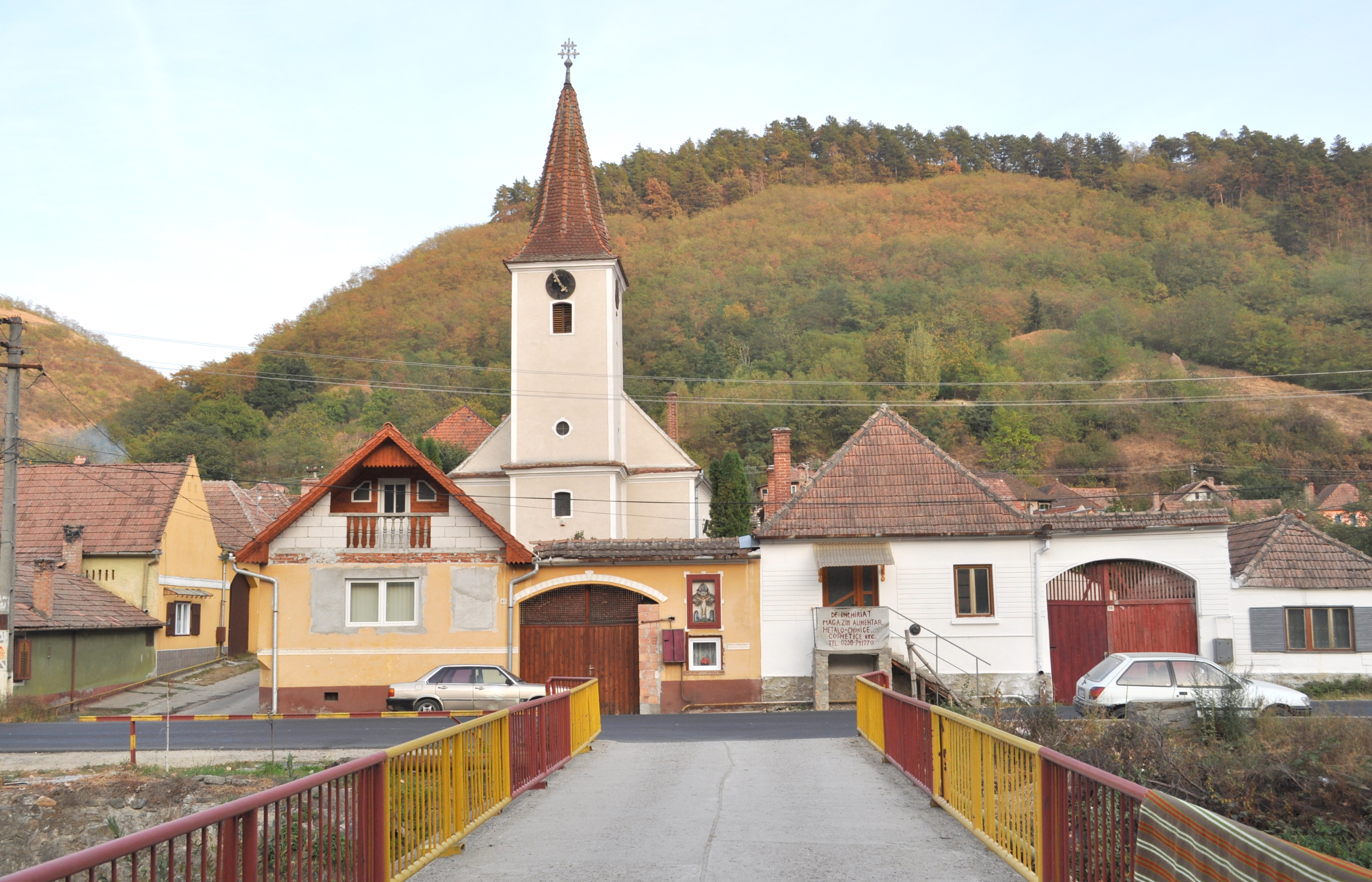 Laz (Săsciori), județul Alba